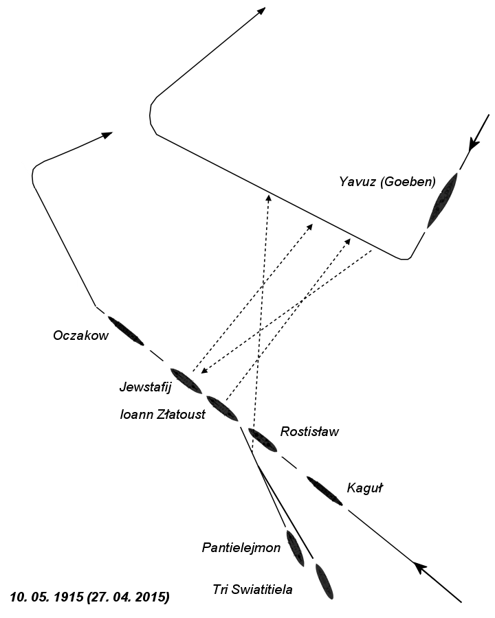 Uproszczony schemat kursów okrętów podczas bitwy pod Bosforem 10 maja 1915 pomiędzy rosyjską Flotą Czarnomorską (flagowy pancernik "Jewstafij") a turecko-niemieckim krążownikiem liniowym "Yavuz Sultan Selim" (SMS "Goeben"). Sylwetki okrętów w skali wobec siebie.